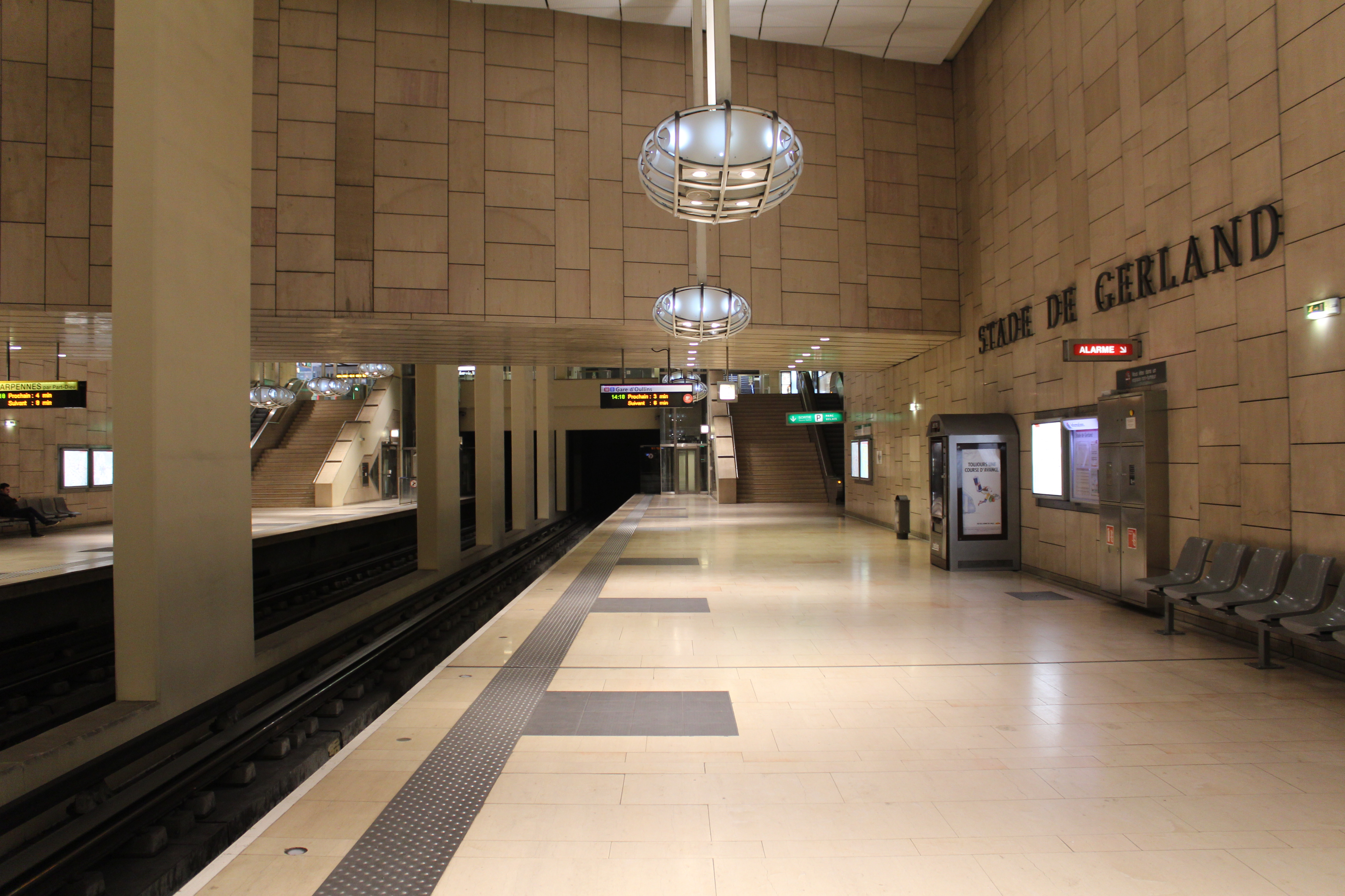 Station de métro Stade de Gerland, Lyon.